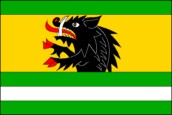 vlajka, Vepřová, okres Žďár nad Sázavou